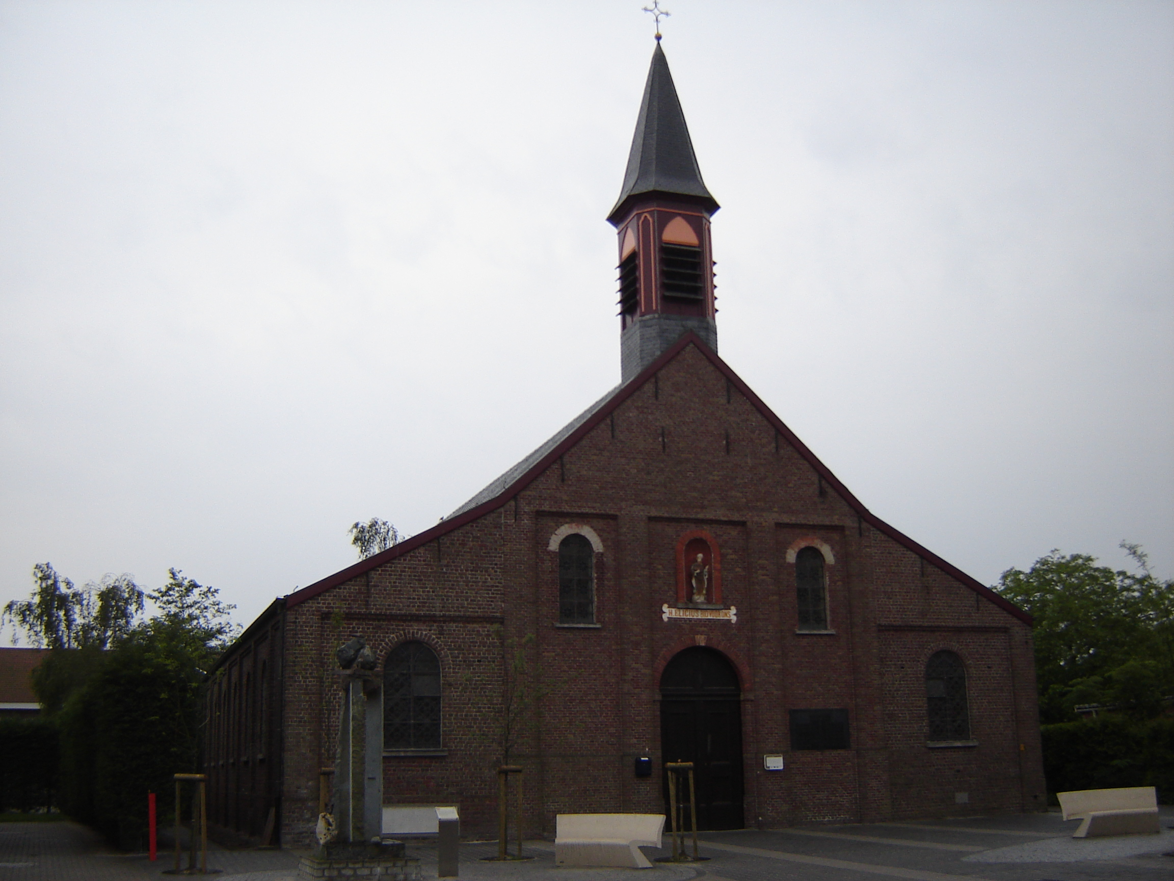 Sint-Eligiuskerk in BentilleChurch of Saint Eligius in Bentille. Bentille, hamlet in Sint-Jan-in-Eremo, Sint-Laureins, East Flanders, Belgium